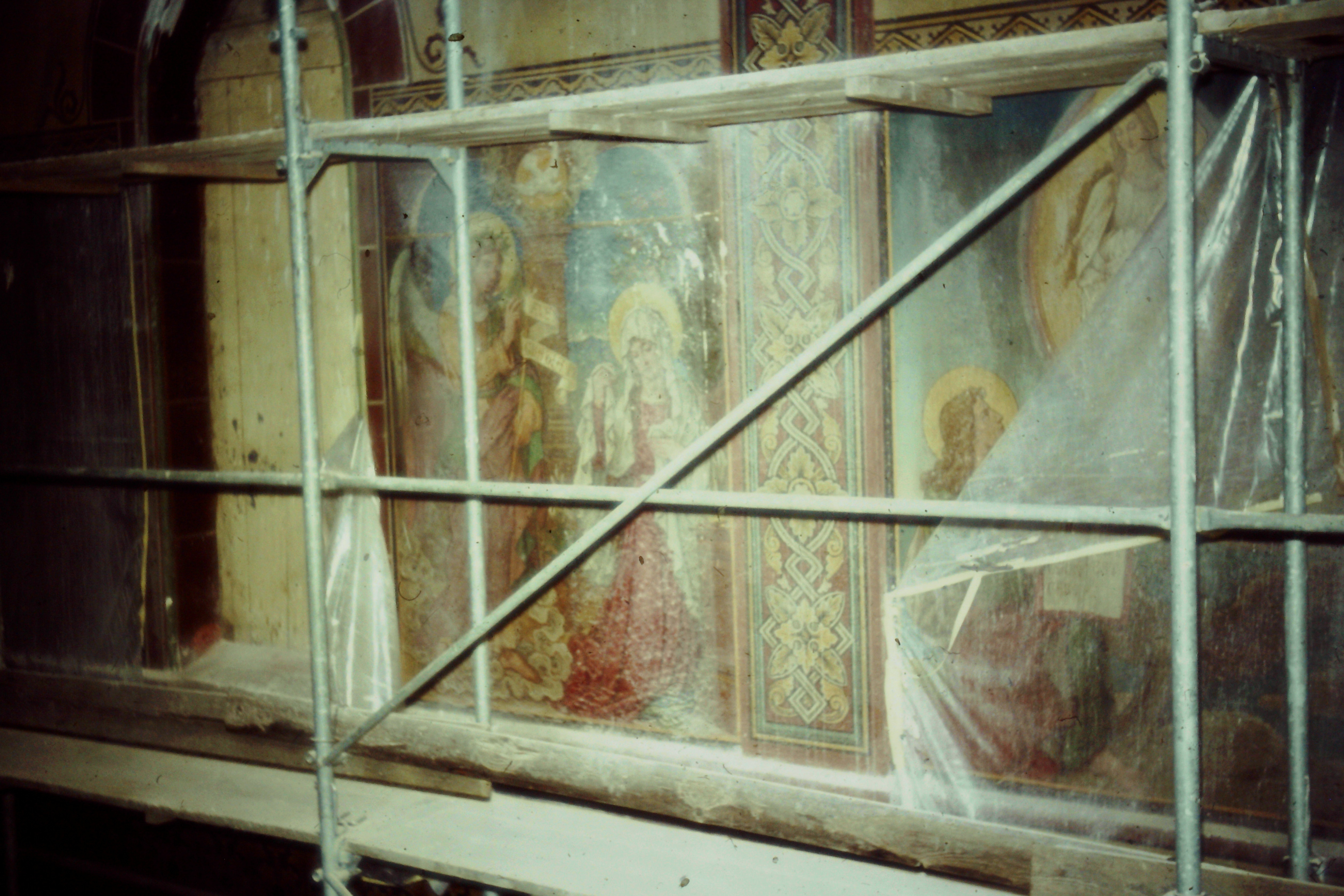 Kirchenrenovation St. Peter und Paul Bonndorf 1972 - 1974 (Bilder aus dem Credo)